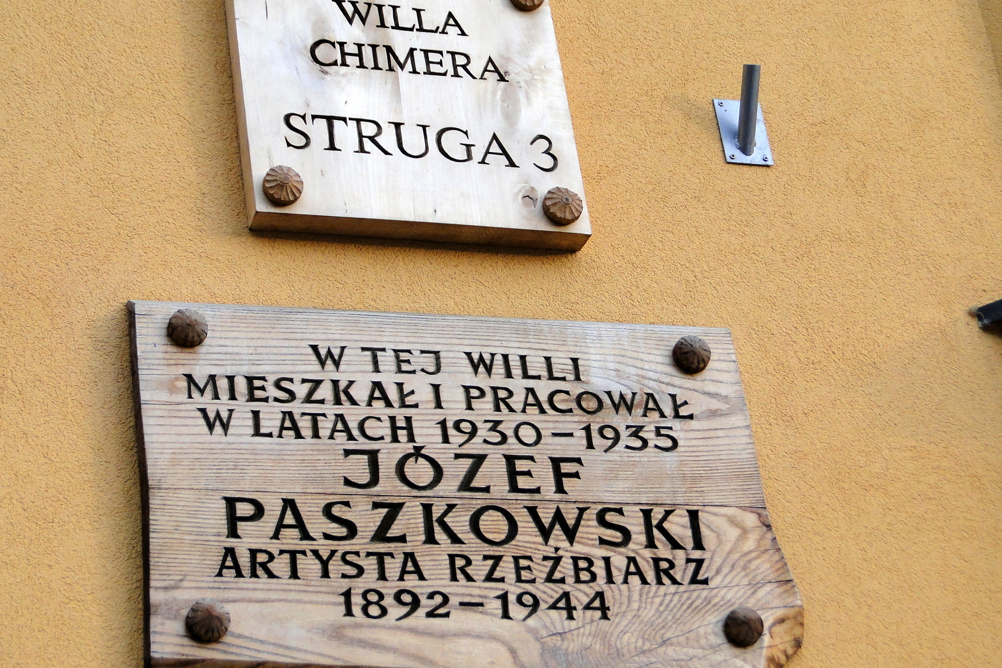 Willa Chimera w Zakopanem (Józef Piotr Mirosław Paszkowski)